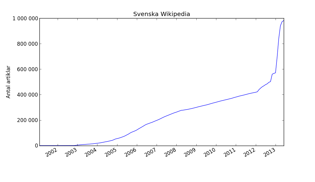 Svenskspråkiga Wikipedias tillväxt. Grafen är gjord i Microsoft Word.